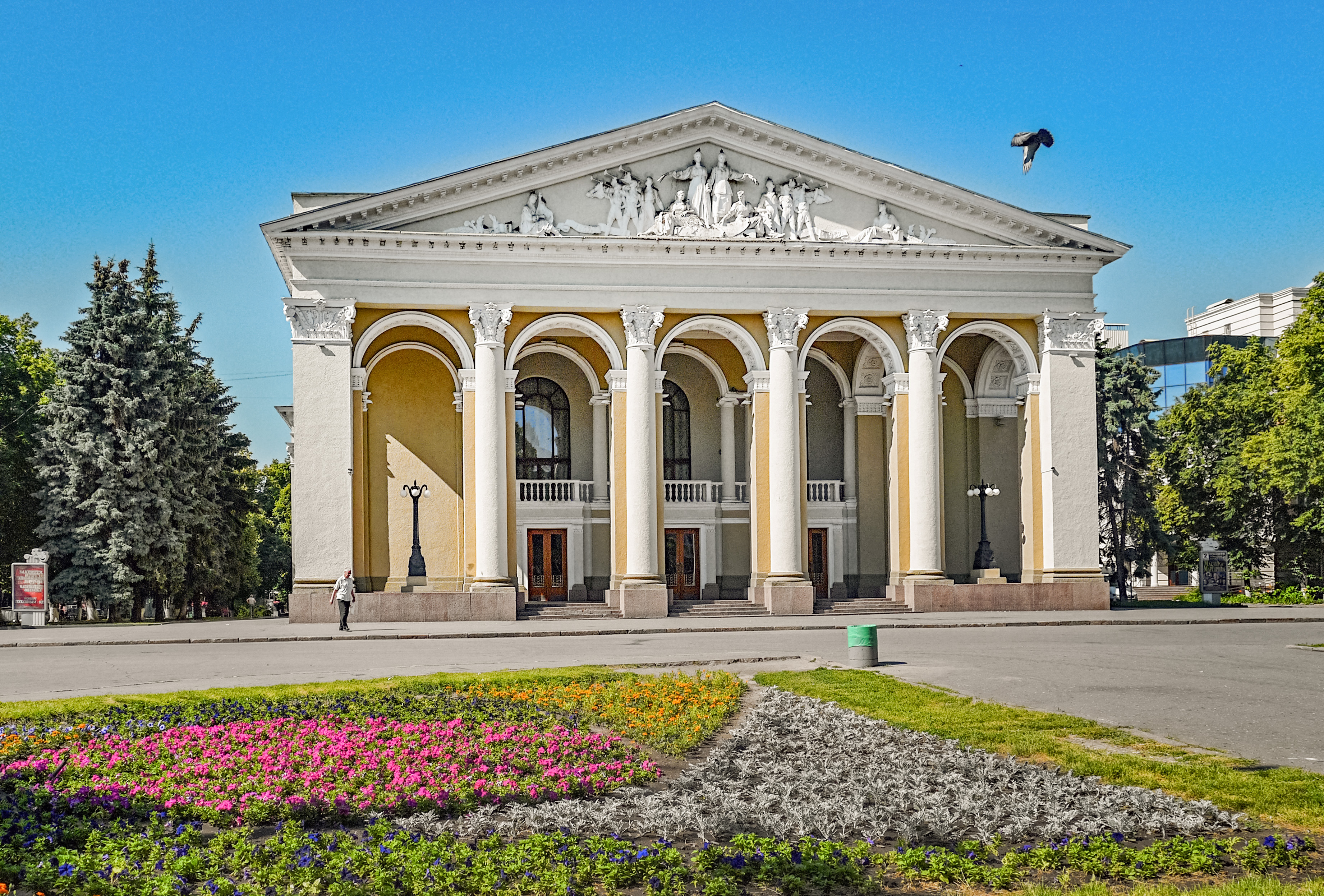 Полтавський академічний обласний український музично-драматичний театр імені Миколи Гоголя, Полтава, вул. Соборності (Жовтнева), 23